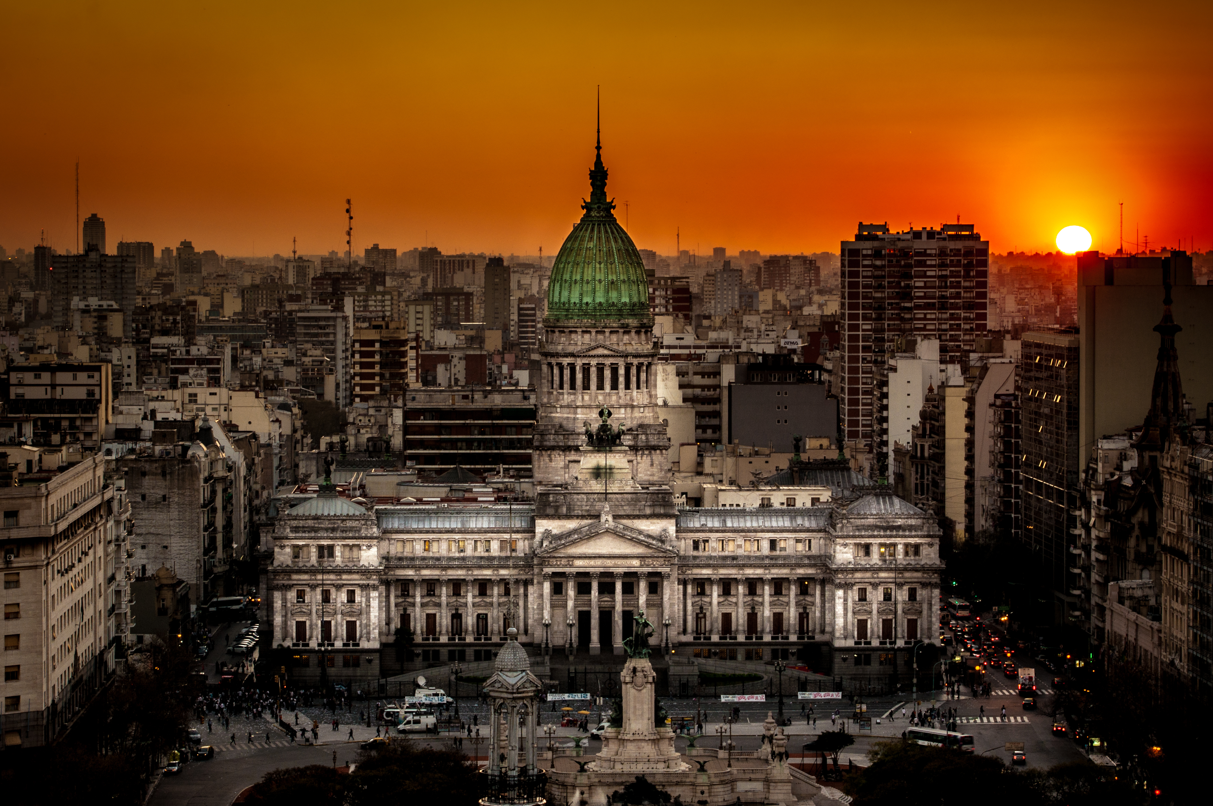 Atardecer en el Congreso de la Nación Argentina, toma realizada desde el faro del edificio Barolo.